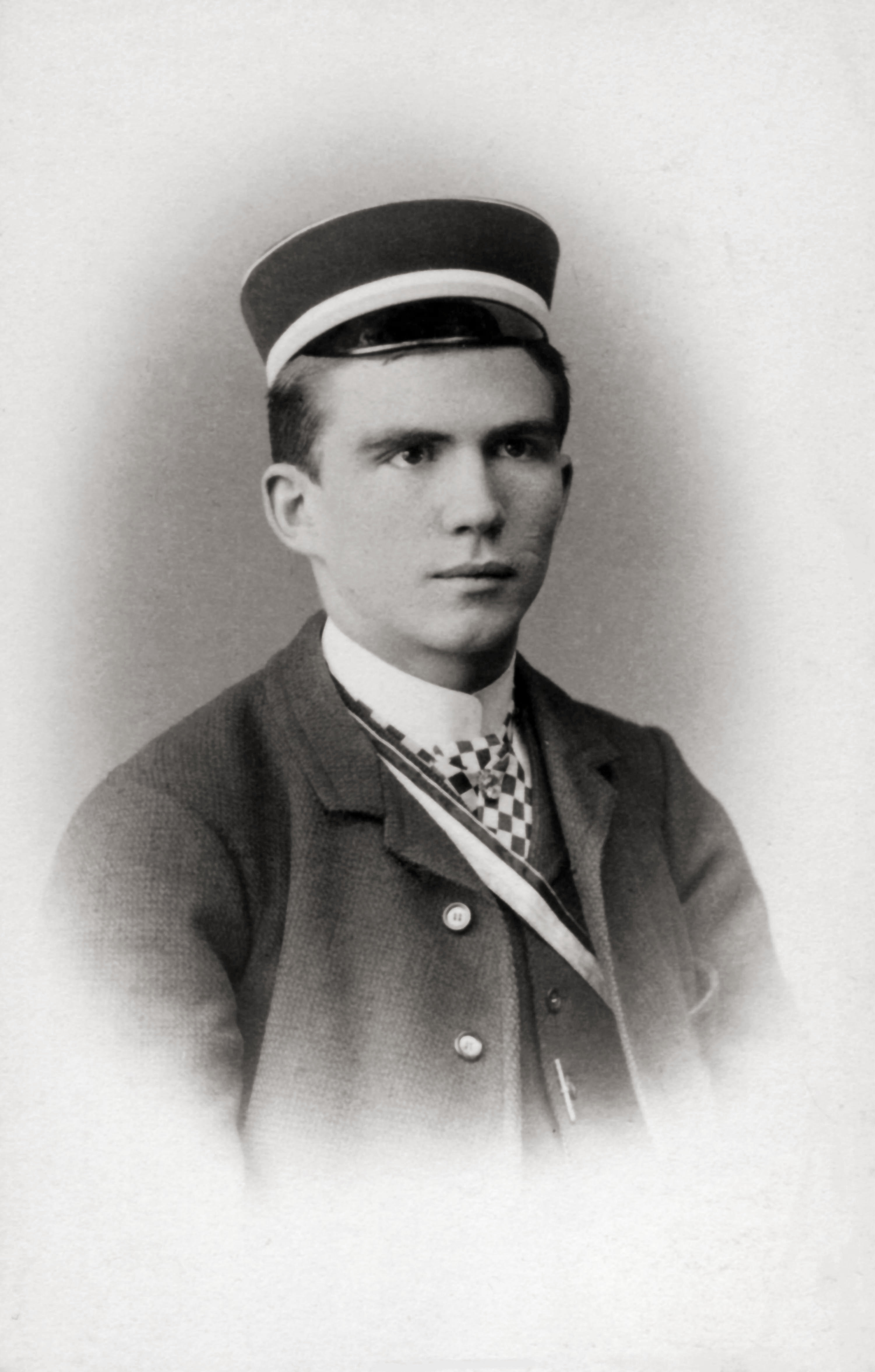 Fotografie von Otto Sayn als Corpsbursche der Suevia München